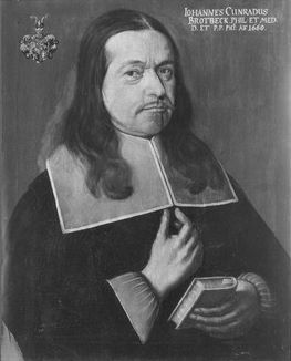 Johann Conrad Brotbeck (1620-1677), Mediziner und Biologe an der Universität Tübingen, Schüler und Schwiegersohn von Carl Bardili.